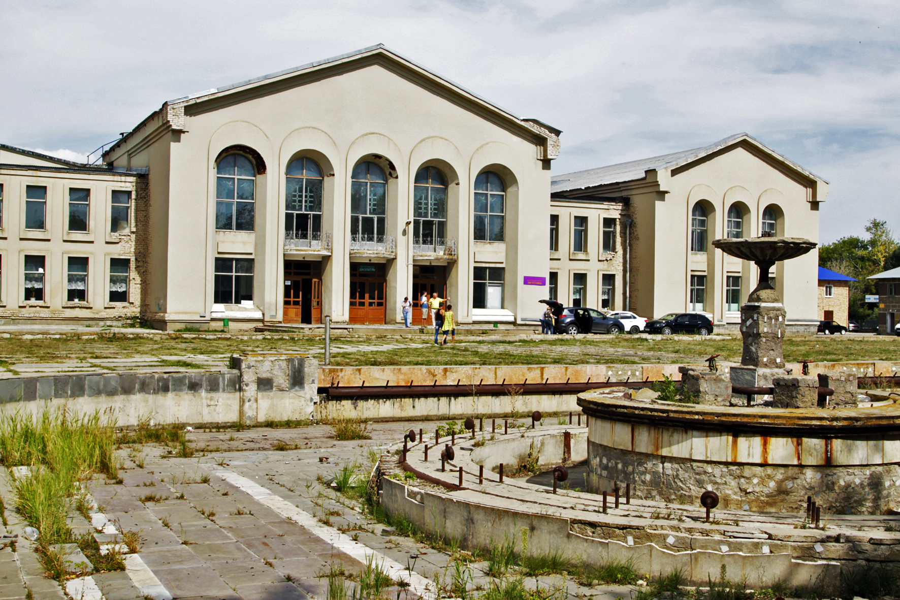 Августовский сельский дом культуры. Августовка, Самарская область, 2019.